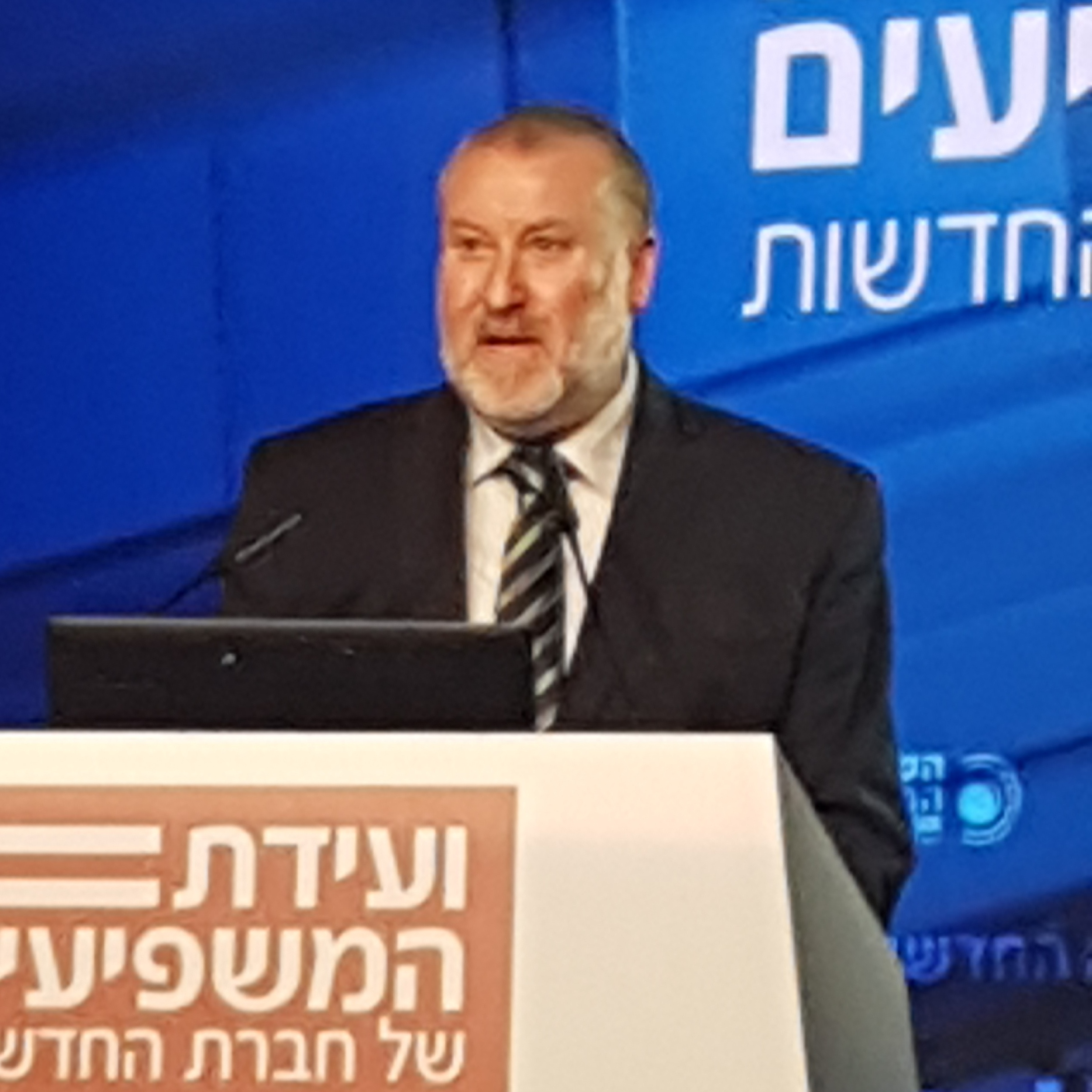 Avichai Mandelblit